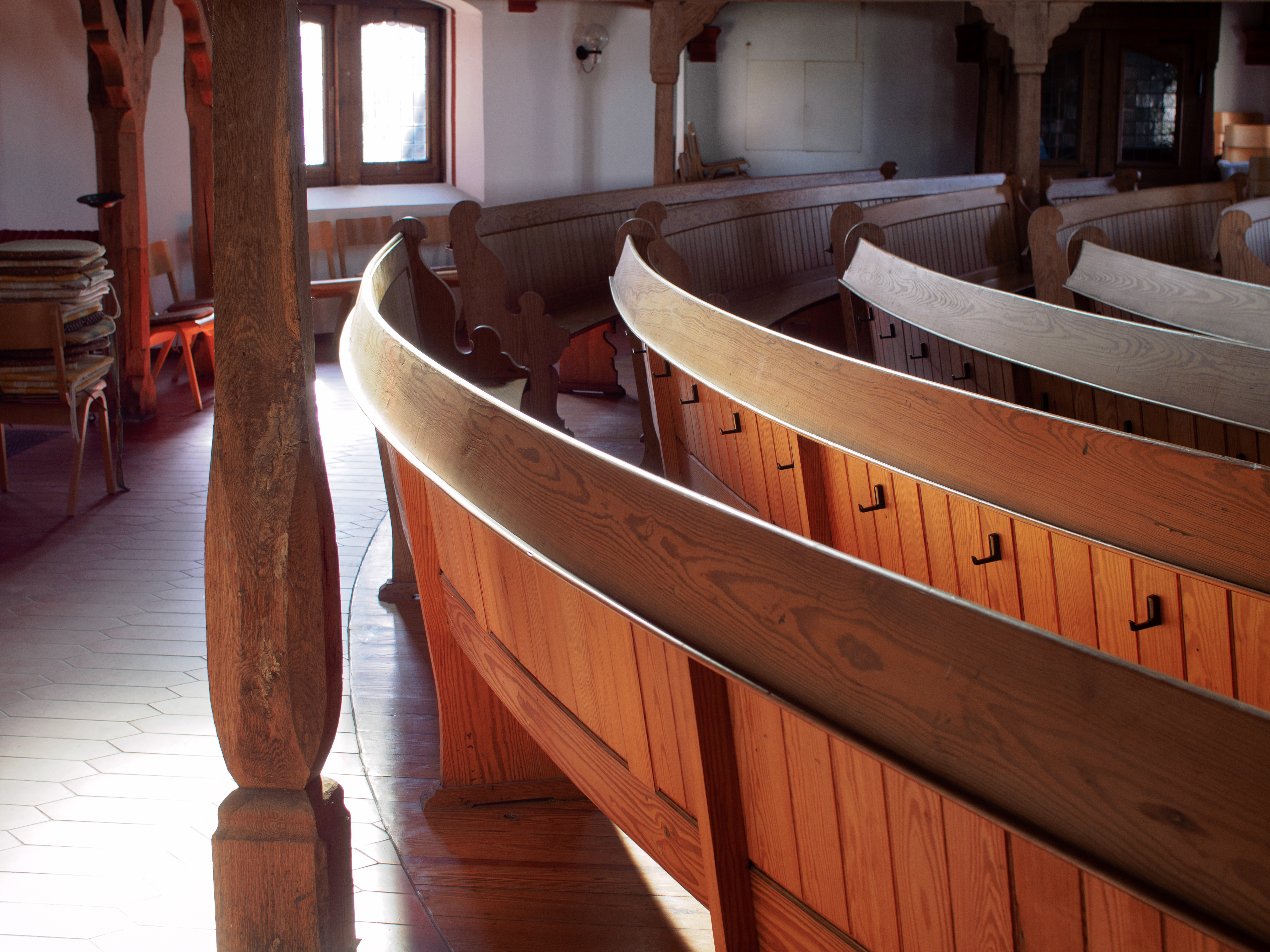 Kirchenbänke Evangelische Kirche Hottenbach